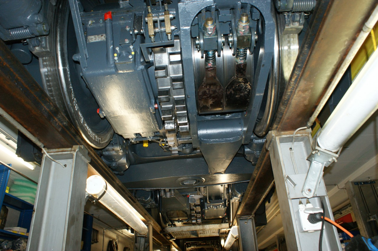 Drehgestell der HGe 4/4 II 104 im Glisergrund